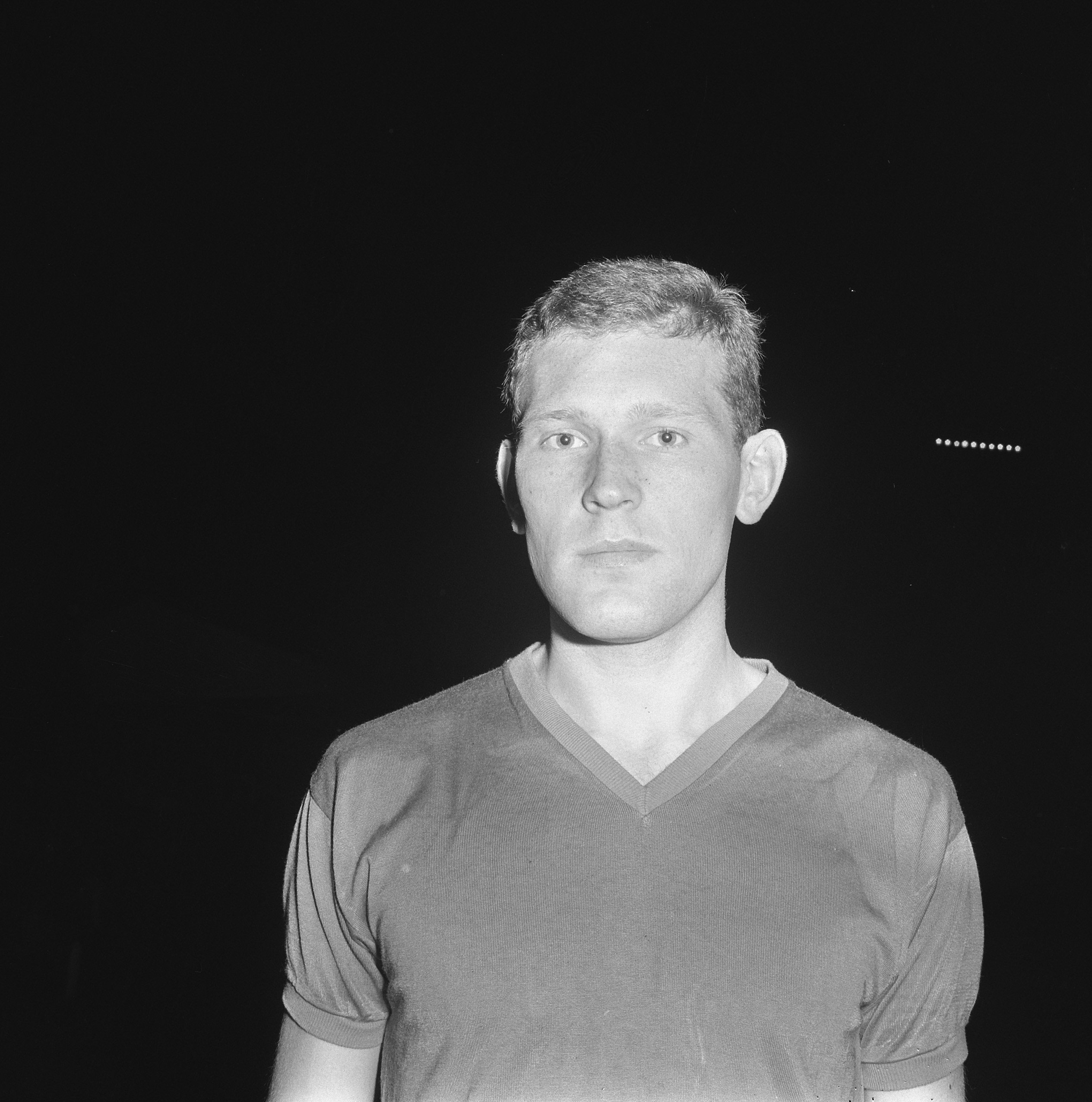 Collectie / Archief : Fotocollectie Anefo Reportage / Serie : [ onbekend ] Beschrijving : Spelers Standaard Luik , Bouglet (kop) Datum : 16 september 1965 Trefwoorden : SPELERS, sport, voetbal Instellingsnaam : Standard Luik Fotograaf : Nijs, Jac. de / Anefo Auteursrechthebbende : Nationaal Archief Materiaalsoort : Negatief (zwart/wit) Nummer archiefinventaris : bekijk toegang 2.24.01.03 Bestanddeelnummer : 918-1934